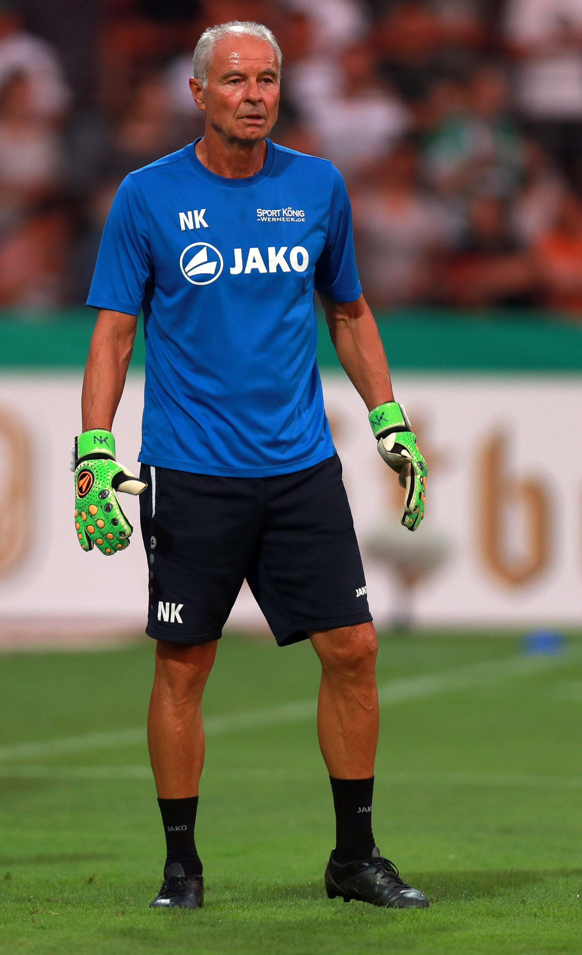 DFB-Pokal 2018/19, 1. Hauptrunde: 1. FC Schweinfurt 05 gegen FC Schalke 04 0:2 (0:1)